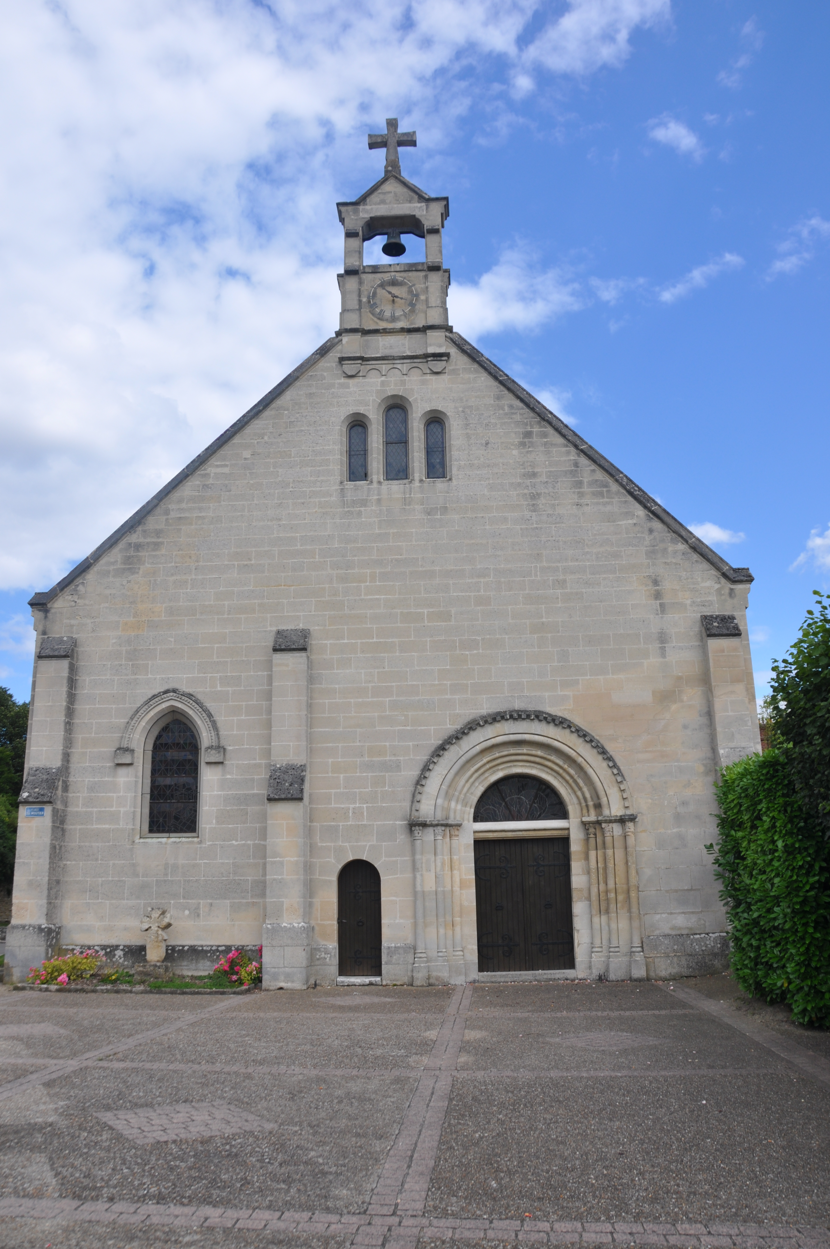 Église de Fontenay-Saint-Père, façade occidentale.